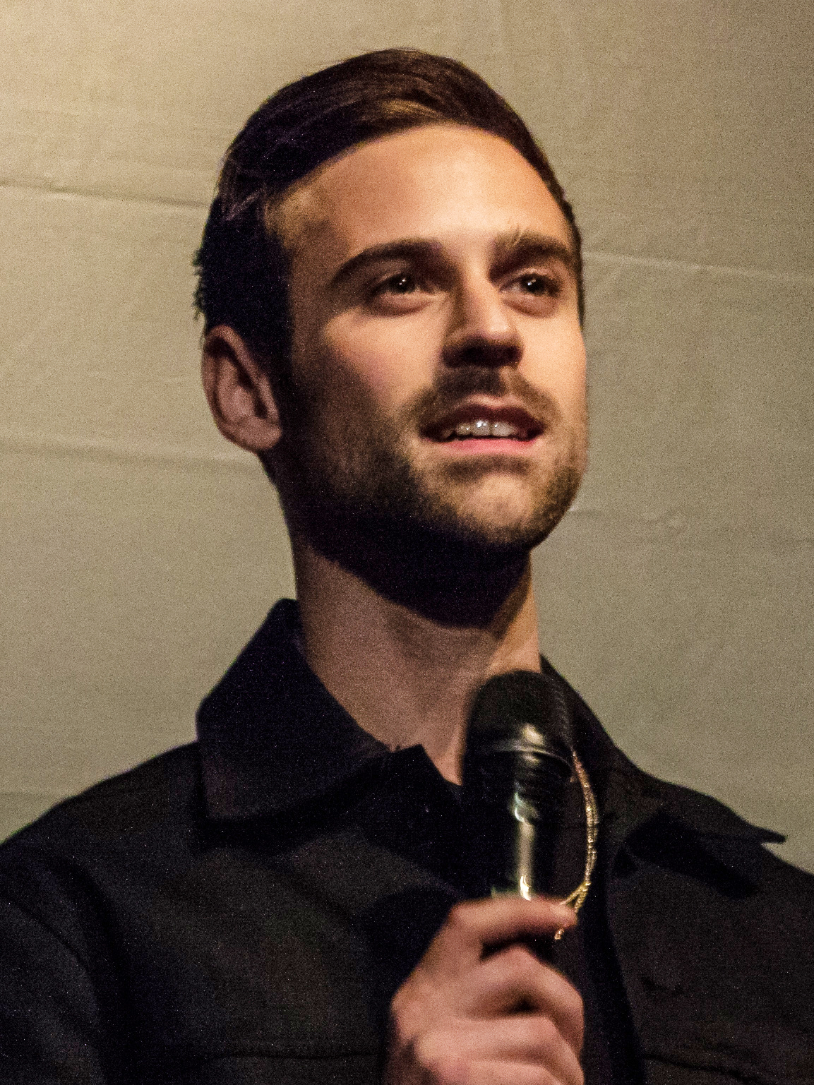 El músico, disc jockey, productor musical, diseñador gráfico y fotógrafo estadounidense Ryan Lewis.